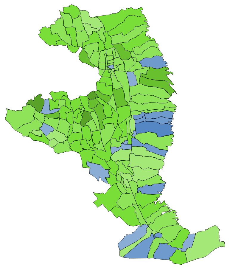 顏色對照表